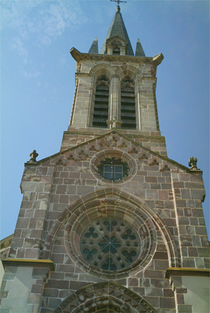 Eglise de Fontenoy-la-joute